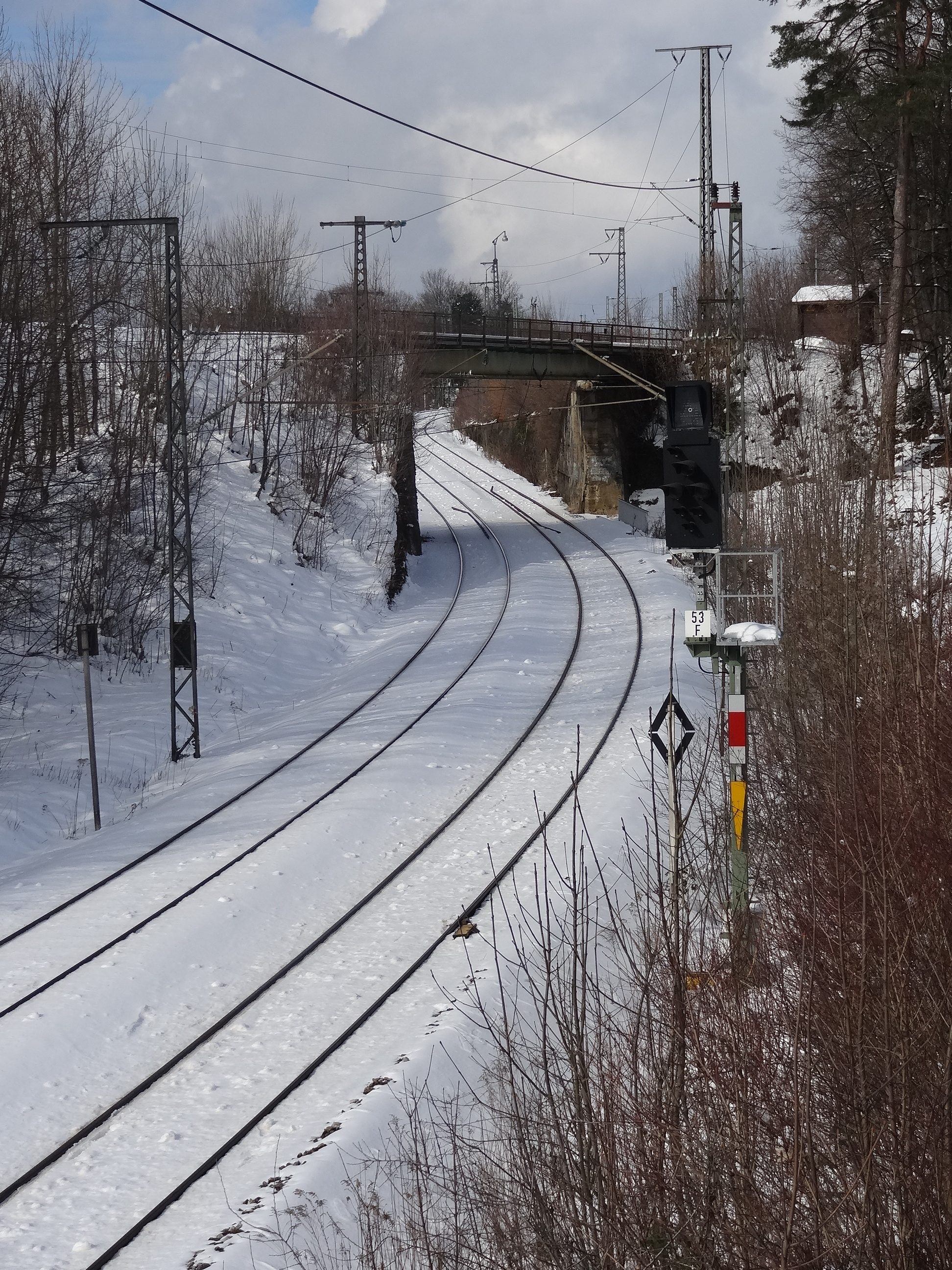 Murnau, Ausgang Überwerfungsbauwerk. Die Bahnstrecke Murnau–Garmisch-Partenkirchen verläuft unten, die Strecke und Murnau–Oberammergau oben